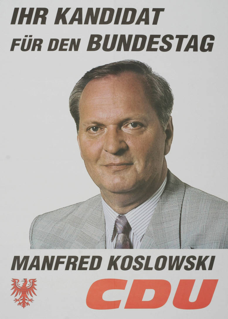 Ihr Kandidat für den Bundestag Manfred Koslowski CDU Abbildung: Porträtfoto - Brandenburgischer Adler Plakatart: Kandidaten-/Personenplakat mit Porträt Objekt-Signatur: 10-001: 4037 Bestand: Plakate zu Bundestagswahlen (10-001) GliederungBestand10-18: Plakate zu Bundestagswahlen (10-001) » Die 13. Bundestagswahl am 16. Oktober 1994 » CDU » Mit Porträtfoto Lizenz: KAS/ACDP 10-001: 4037 CC-BY-SA 3.0 DE